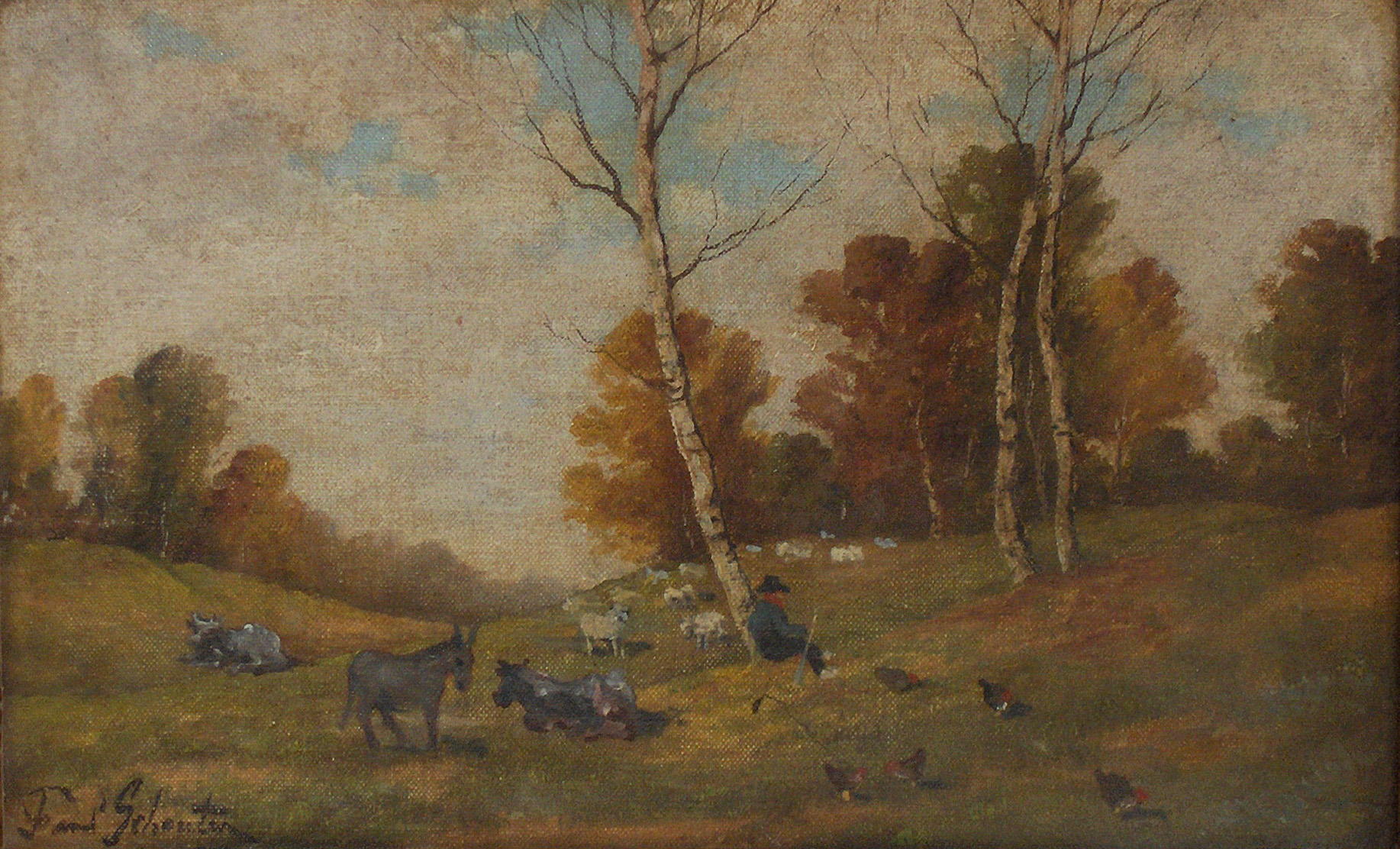 "Lanschap met herder en dieren", olieverf op paneel, 25 x 41 cm, door Paul Schouten (1860-1922); privé-bezit